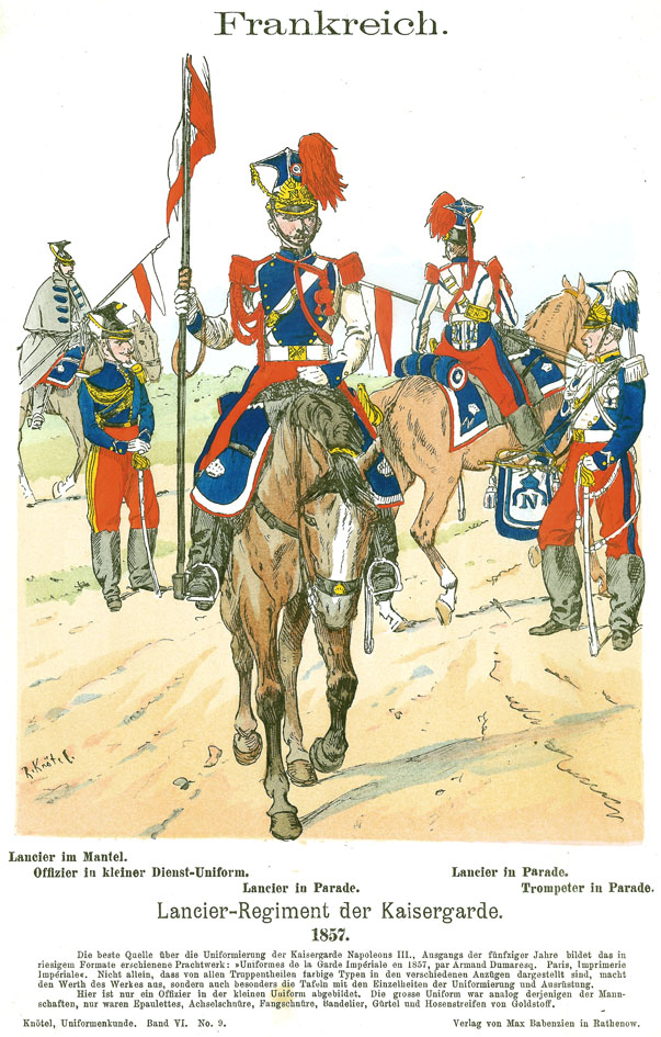 Richard Knötel, « Uniformenkunde, Lose Blätter zur Geschichte der Entwicklung der militärischen Tracht », Berlin, 1890. Volume VI, planche 9. Lanciers de la Garde impériale, 1857, officier, trompette et soldats.